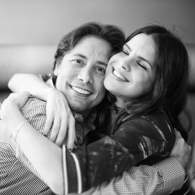 Luis!